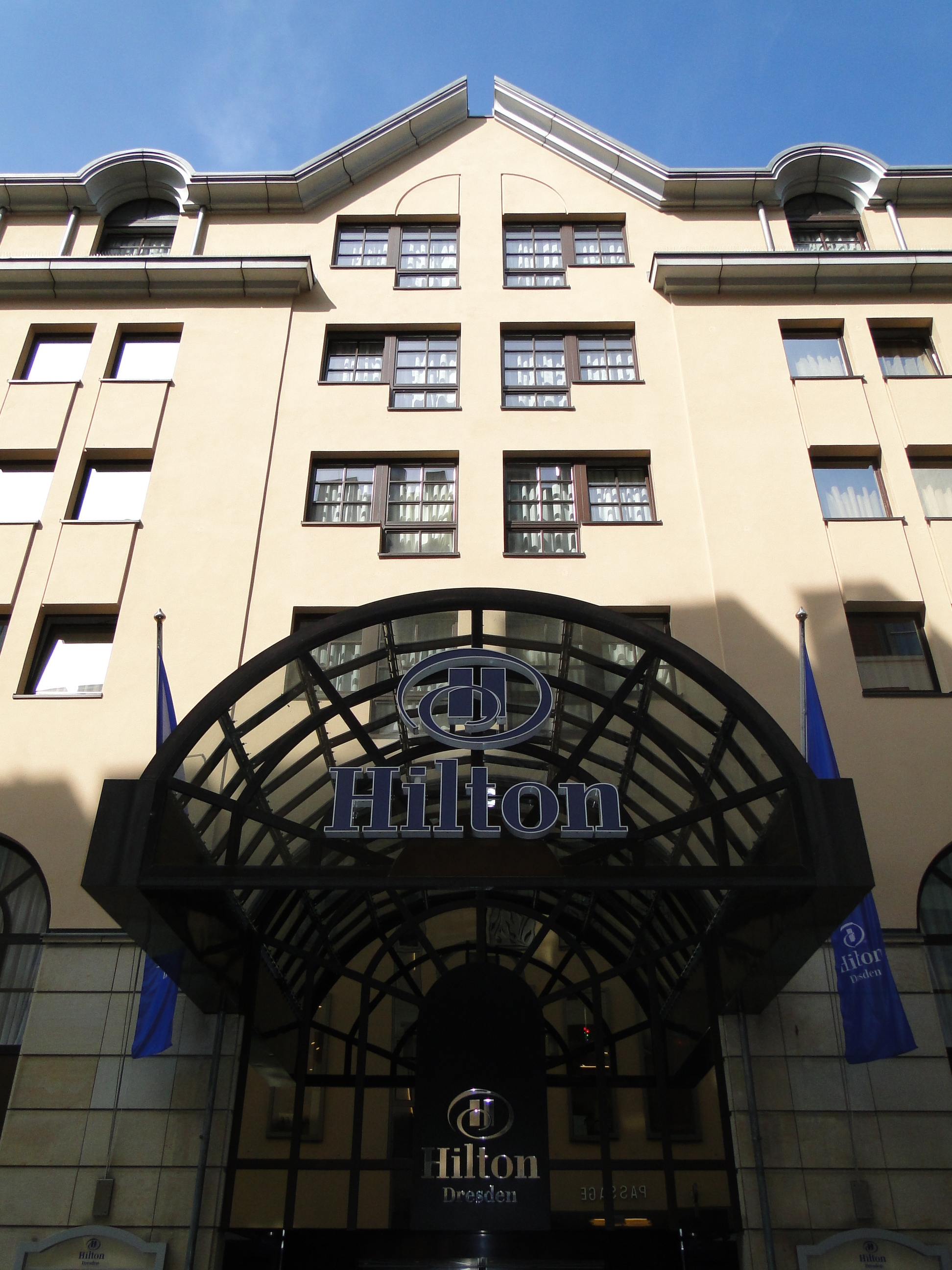 Eingang des Dresdner Hilton-Hotels am Neumarkt